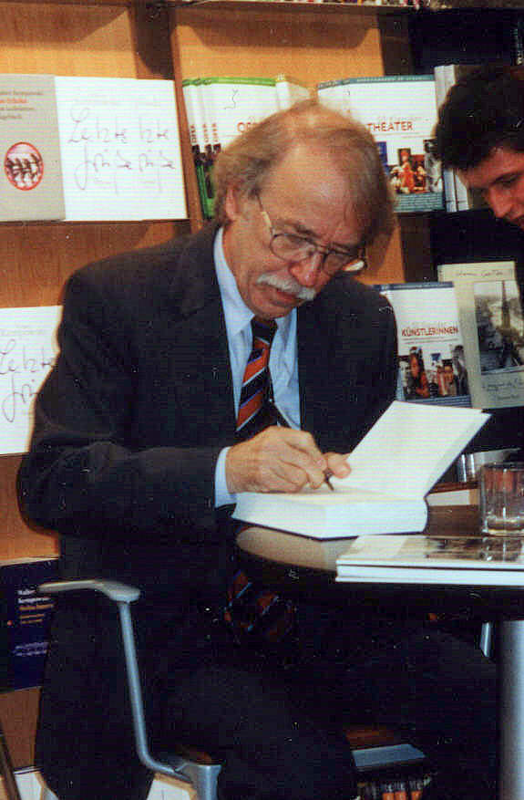 Beschreibung: Walter Kempowski bei Lesung in Rostock Quelle: selbst fotografiert Fotograf: Benutzer:Thorbjoern Andere Version